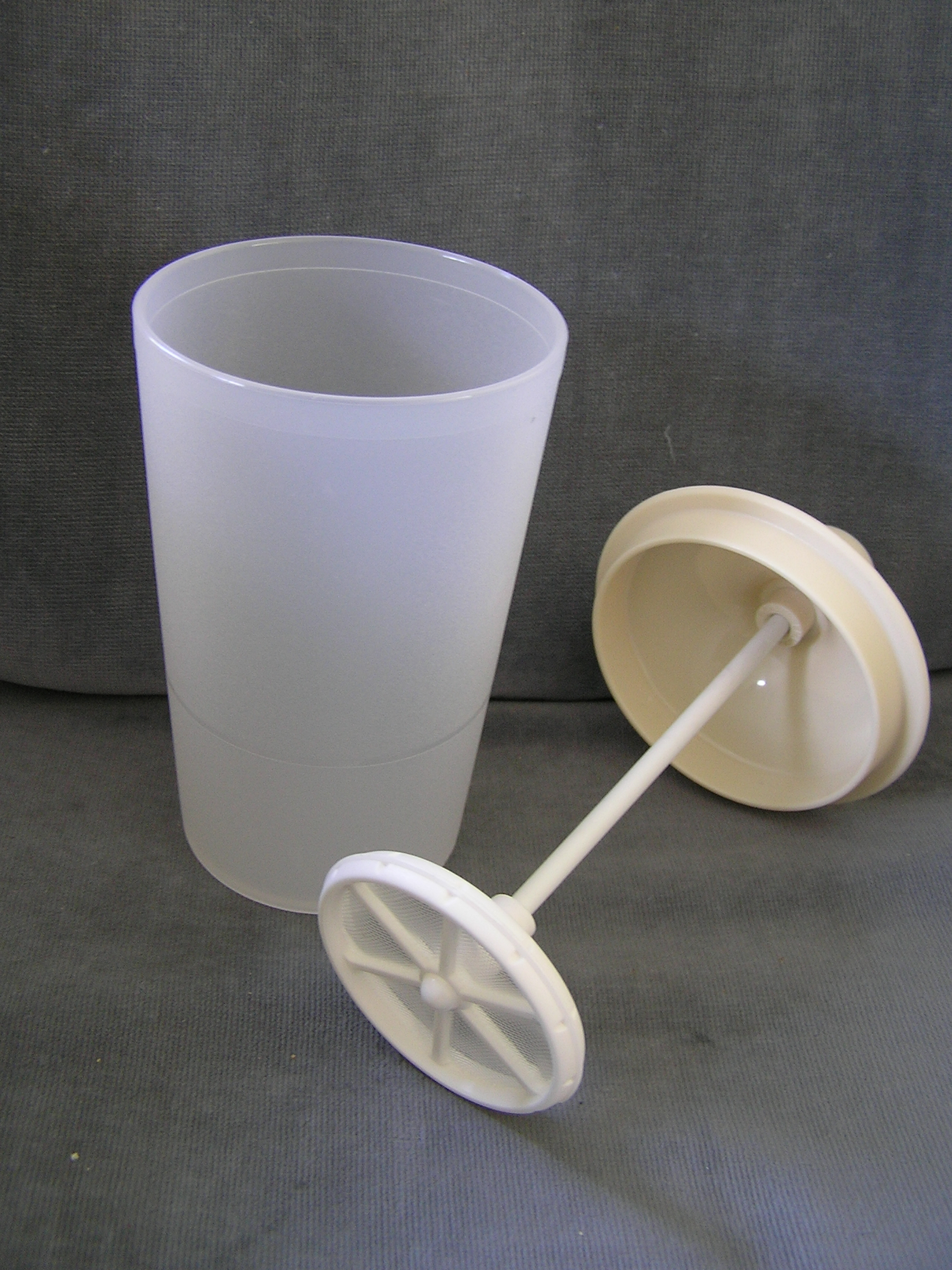 Melkklopper bestaande uit een zeefje dat in een kannetje door de melk kan worden gedrukt.